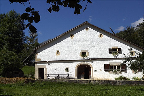 Freilichtmuseum Ballenberg